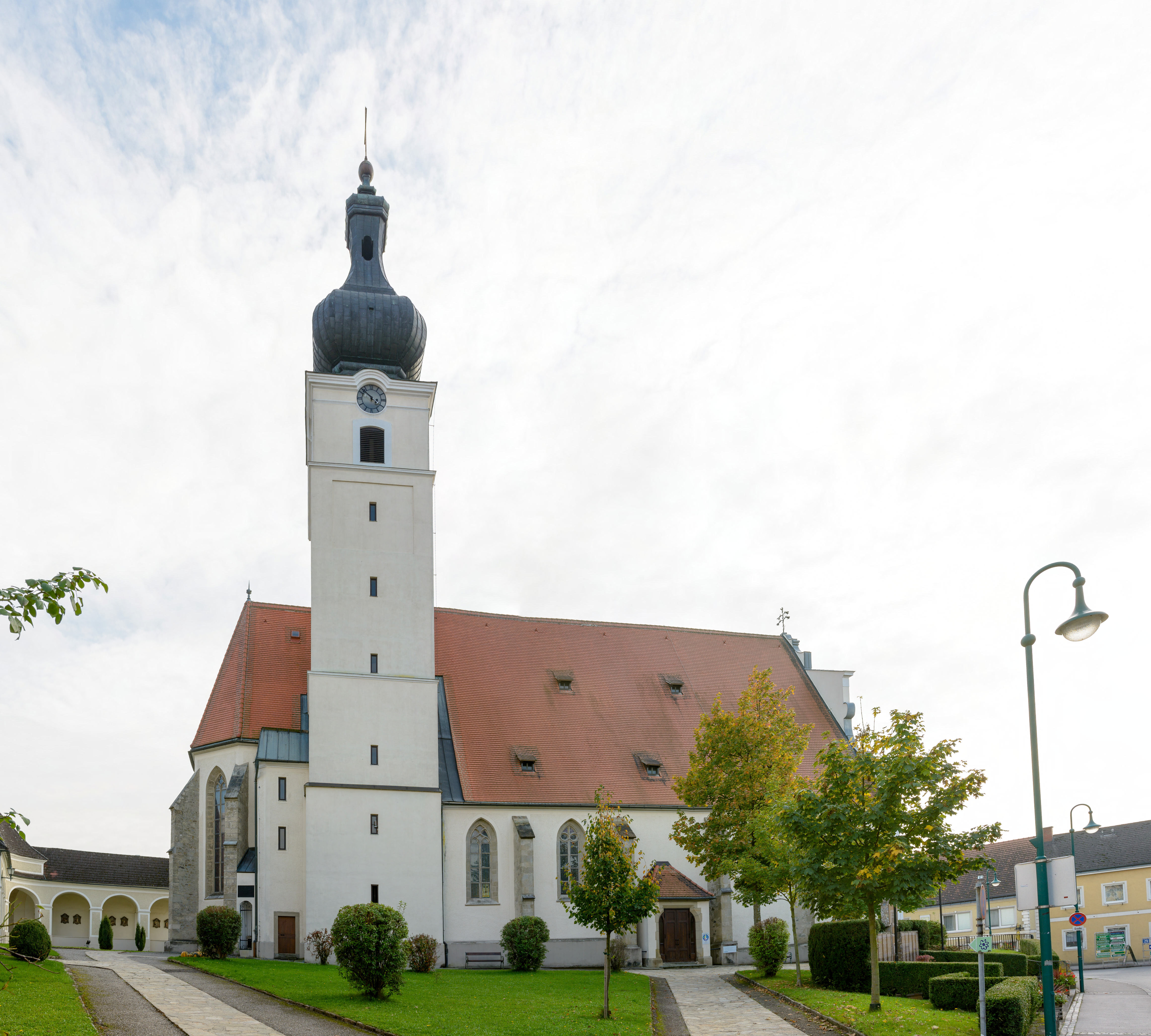 Kath. Pfarrkirche Mariae Himmelfahrt